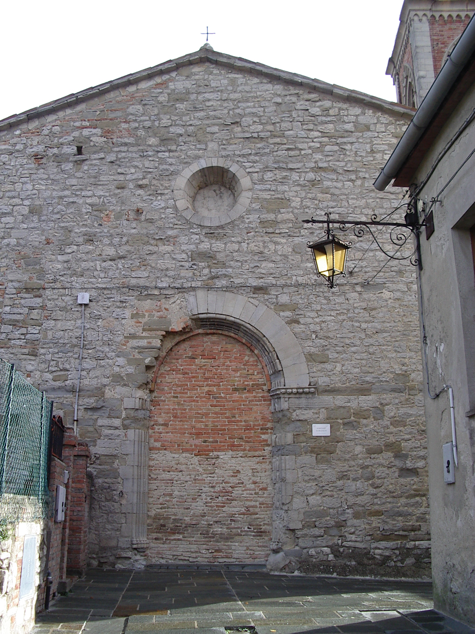 Pieve Santa Maria di Pietralunga , Antique entrée condamnée